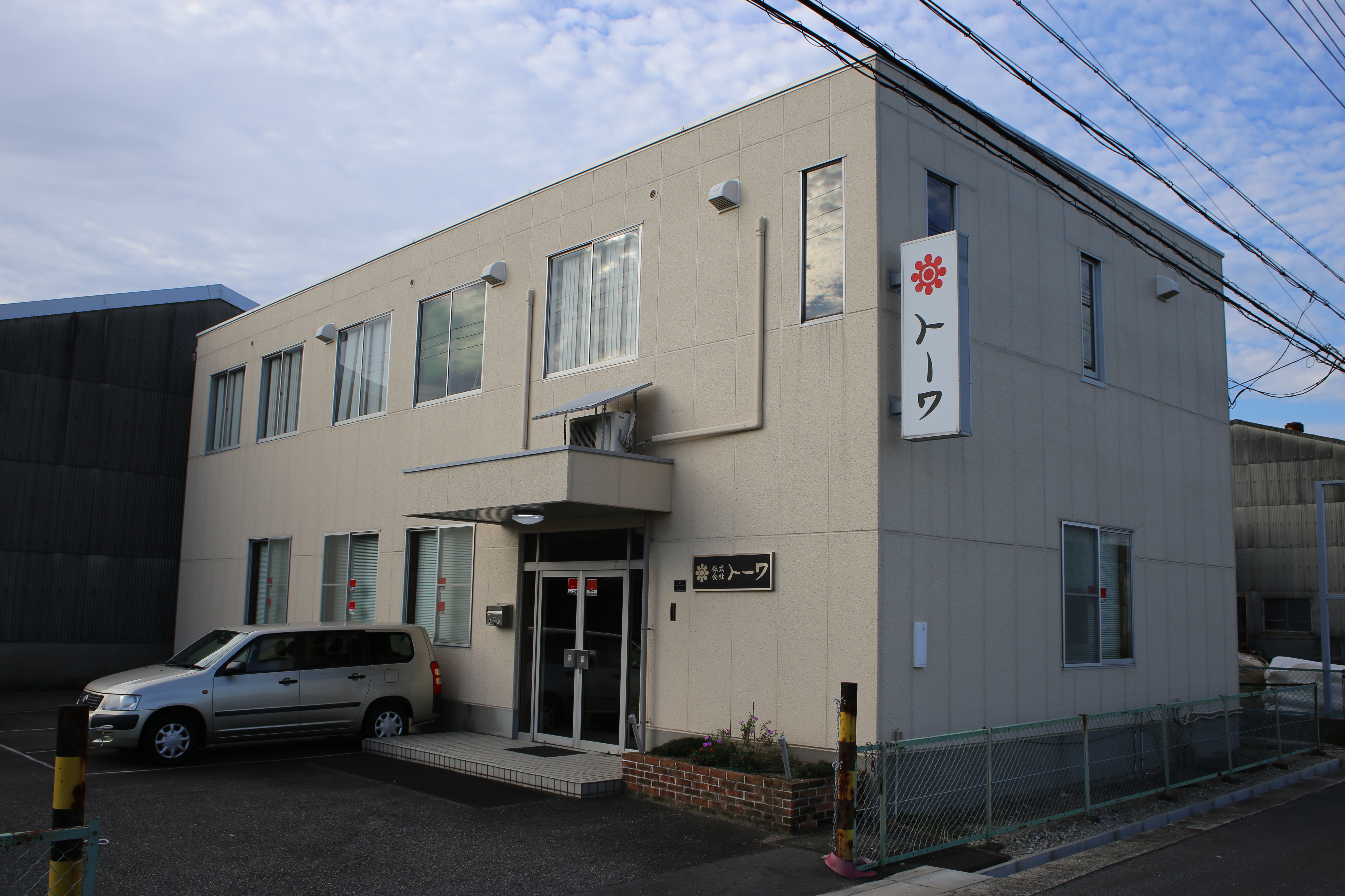 愛知県小牧市大字舟津字久保寺のトーワ本社